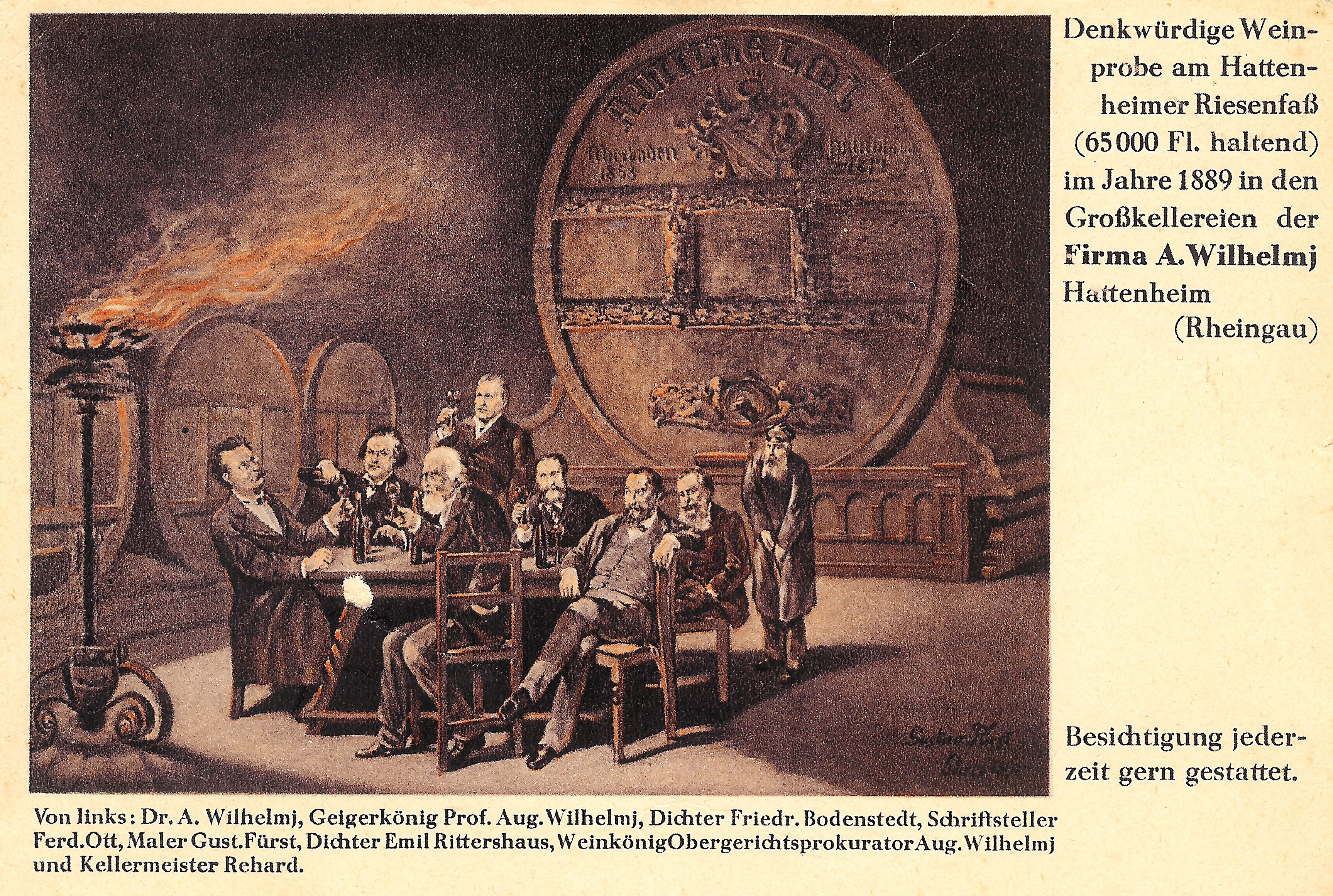 Weinprobe 1889 im Riesenfasskeller des Wilhelmj-Hauses in Hattenheim im Rheingau. V.l.: Albert Wilhelmj, Geigerkönig August Wilhelmj, Friedrich Bodenstedt, Ferdinand Ott, Gustav Fürst, Emil Rittershaus, Prokurator August Wilhelmj, Kellermeister Rehard.